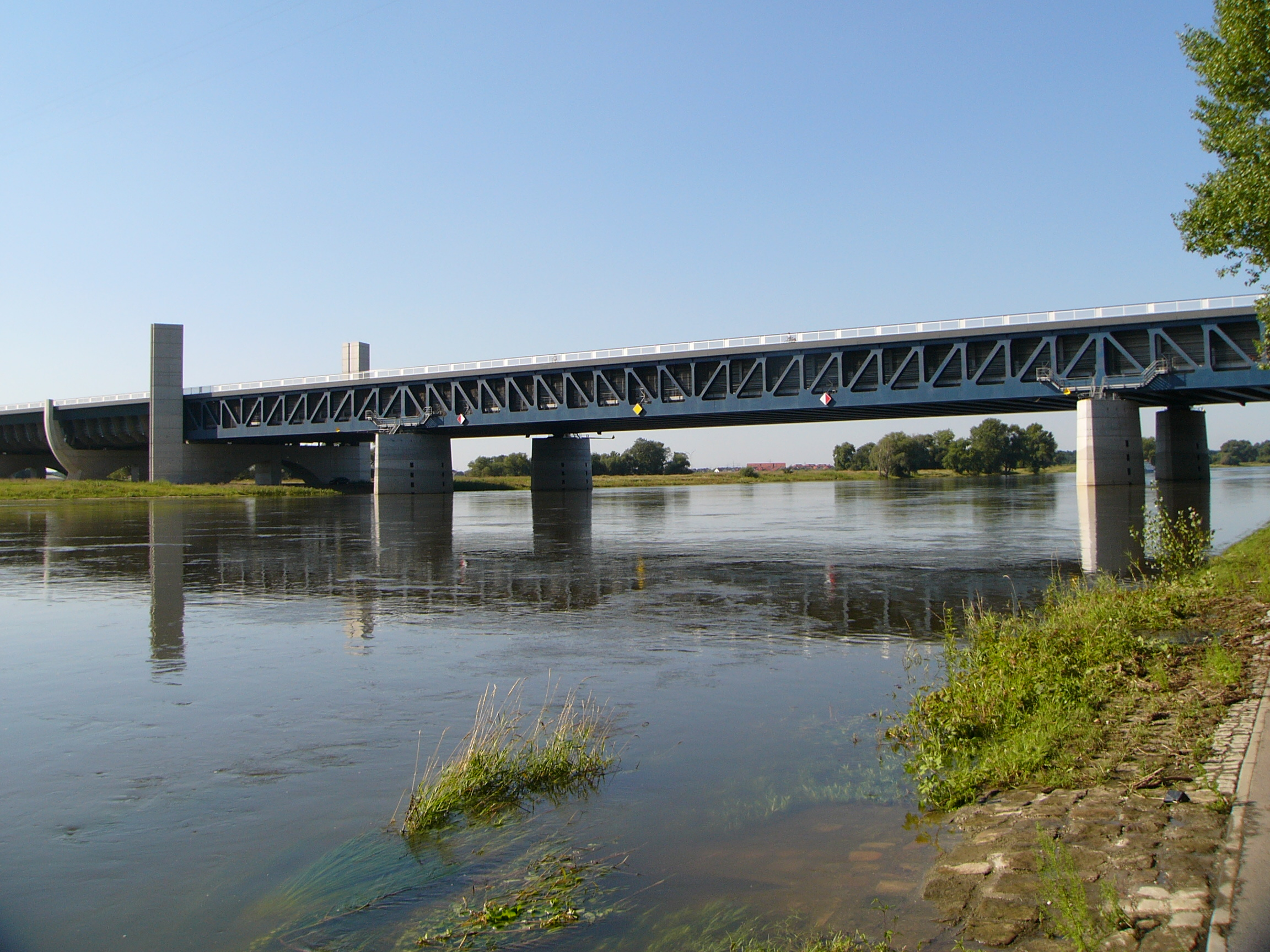 Überfuehrung des MLK ueber die Elbe bei Magdeburg